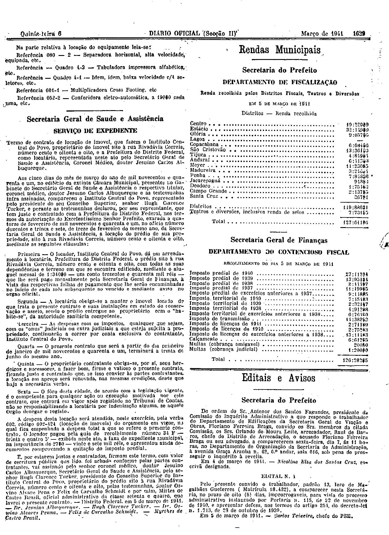 Diário oficial de 1941